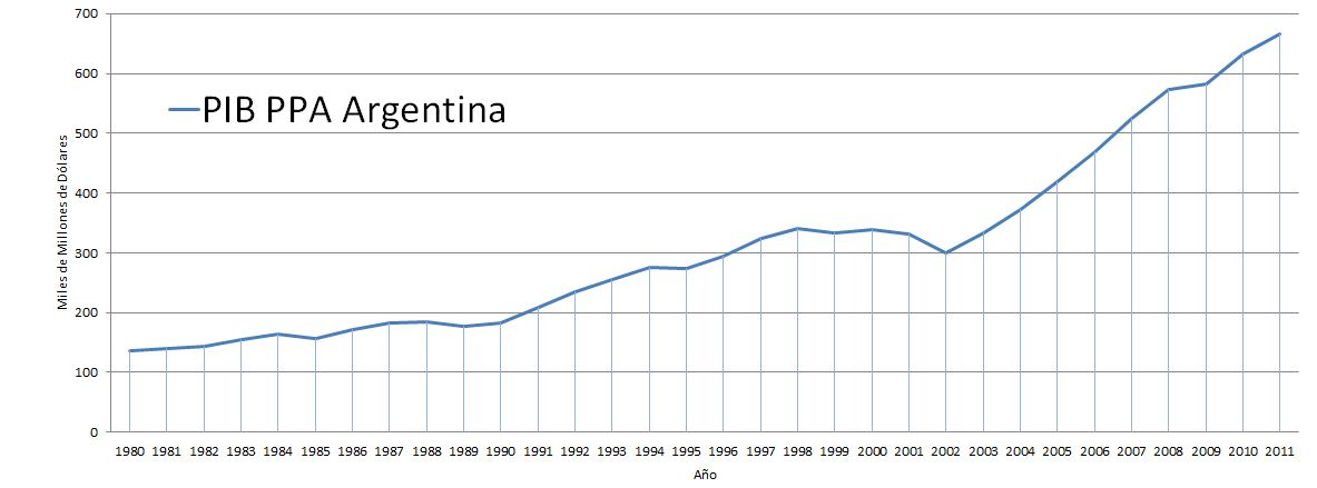 FMI October 2010